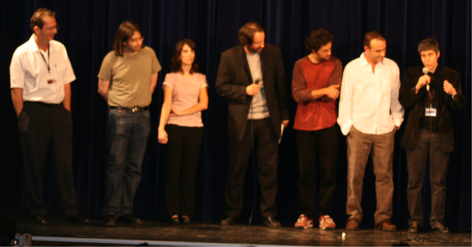 L'équipe du film La voie lactée (A via láctea) lors de la 46è Semaine Internationale de la Critique avec Jean-Christophe Berjon, délégué général